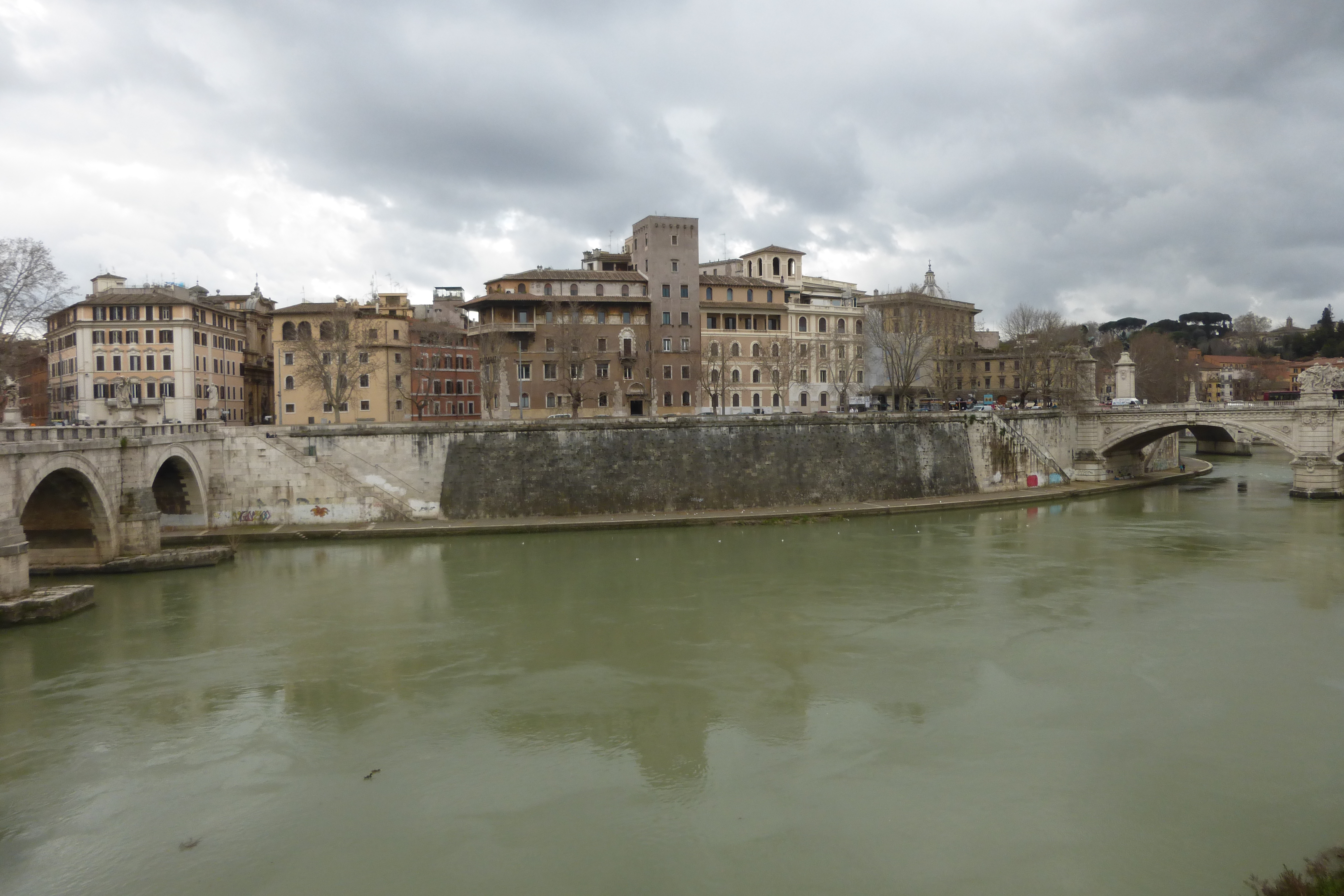 Roma, lungotevere degli Altoviti tra ponte S. Angelo a sinistra e ponte Vittorio a destra.